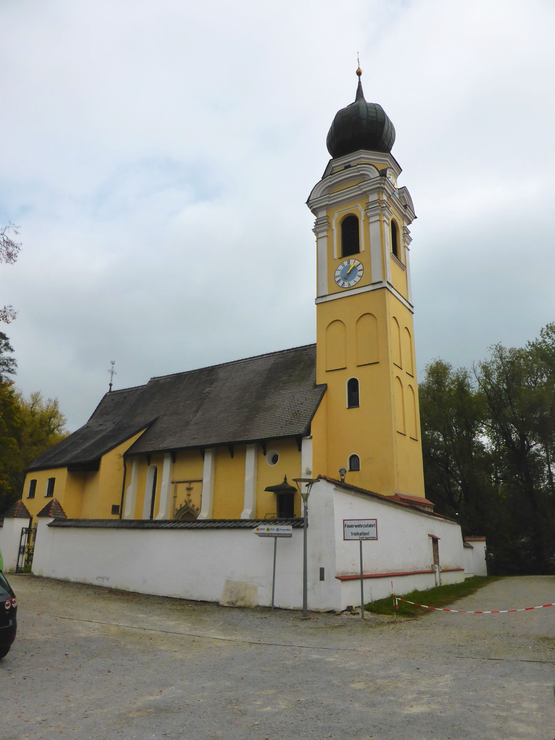 Gern (Kirche St. Georg mit Friedhof)